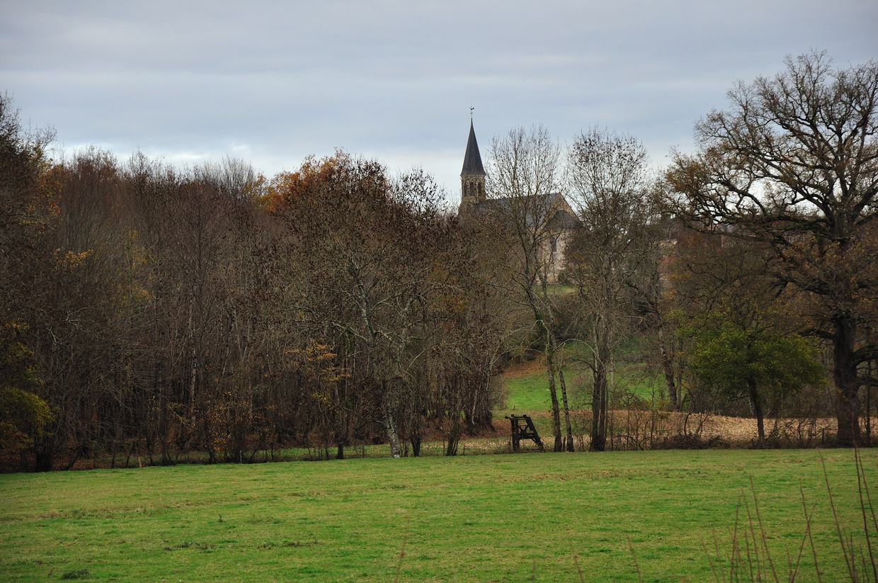 Oulches (Indre) - Village et vallée du Brion